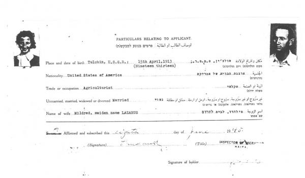 כדי לעלות כמה שיותר חברים צעירים לארץ, היה צורך לחתן זוגות ובכך להרוויח מקום.הנשאוים היו פקטיבים וברגע הגיעם לארץ הלכו לרבנות והתגרשו